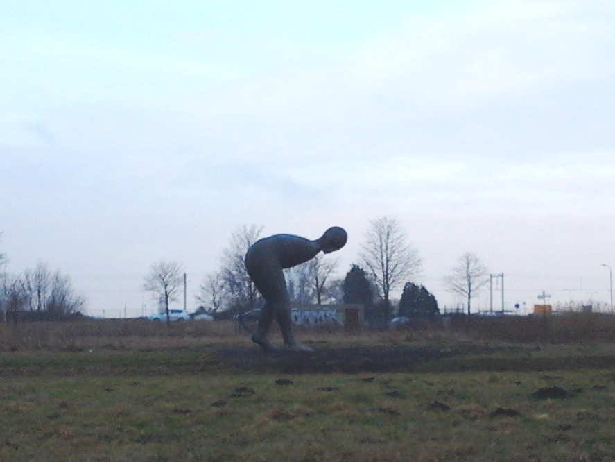 de noordeling